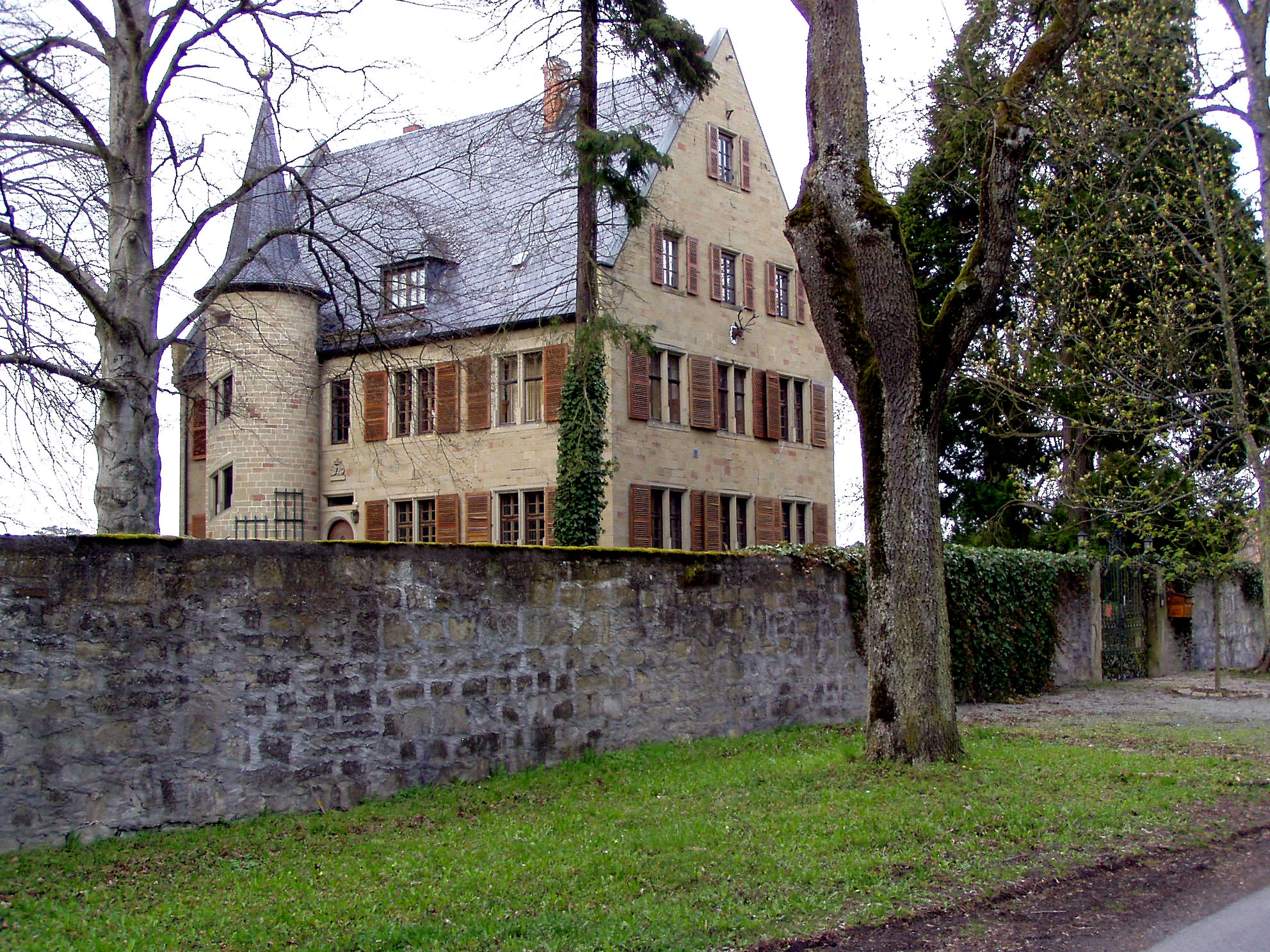 Das schönbornsche Jagdschloss im Weiler Ilmbach / Steigerwald